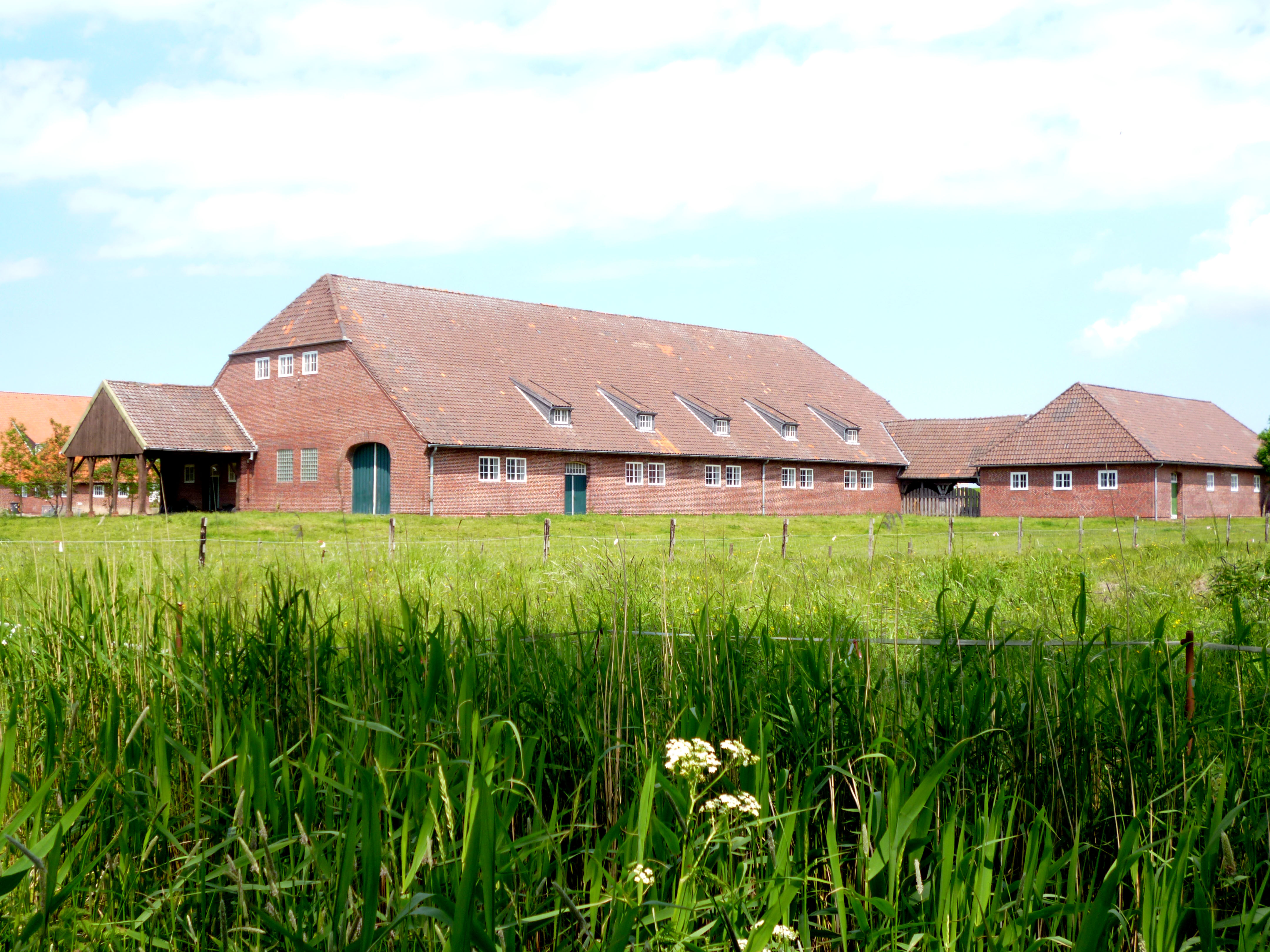 Ehemalige Flugzeughallen (hier: Hangars als Bauernhöfe getarnt – 53° 32′ 27″ N, 8° 30′ 33″ O) in dem Dorf Volkers bei Blexen in Niedersachsen.